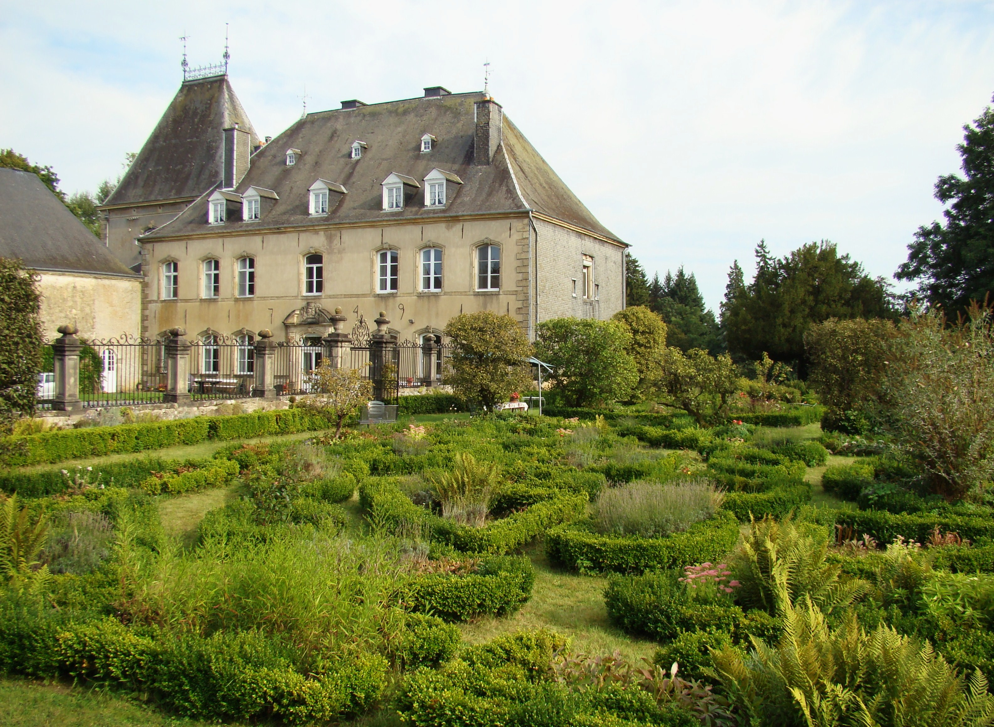 Jardin de buis attenant au châteu de Guirsch